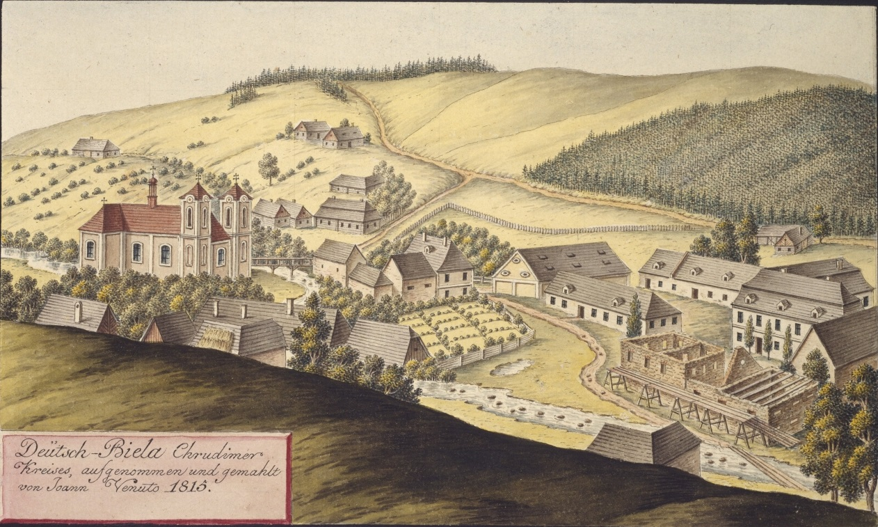 Bělá nad Svitavou. Deutsch-Biela Chrudimer Kreises, aufgenommen und gemahlt von Joann Venuto 1815